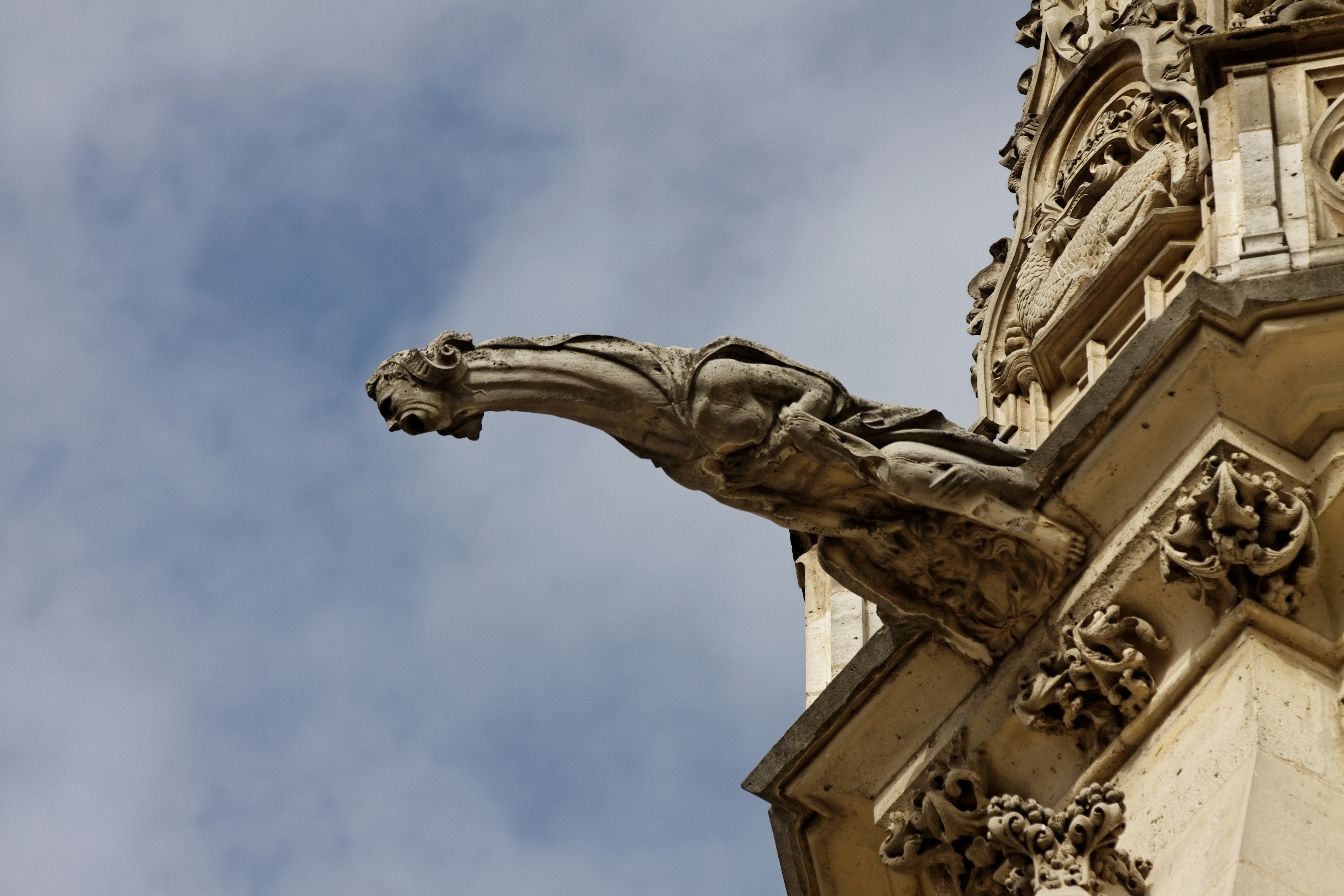 Vue de la chapelle royale du château de Vincennes.